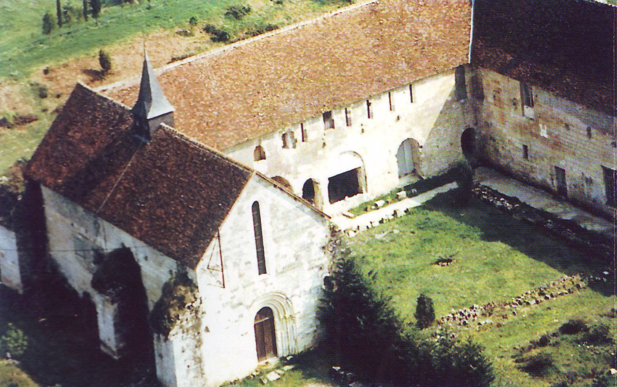 Photo aérienne du Prieuré de Grammont-Villiers situé sur la commune de Villeloin-Coulangé en Indre-et-Loire